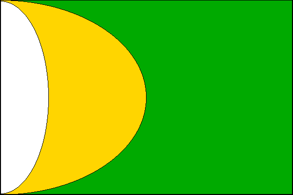 vlajka, Nyklovice, okres Žďár nad Sázavou